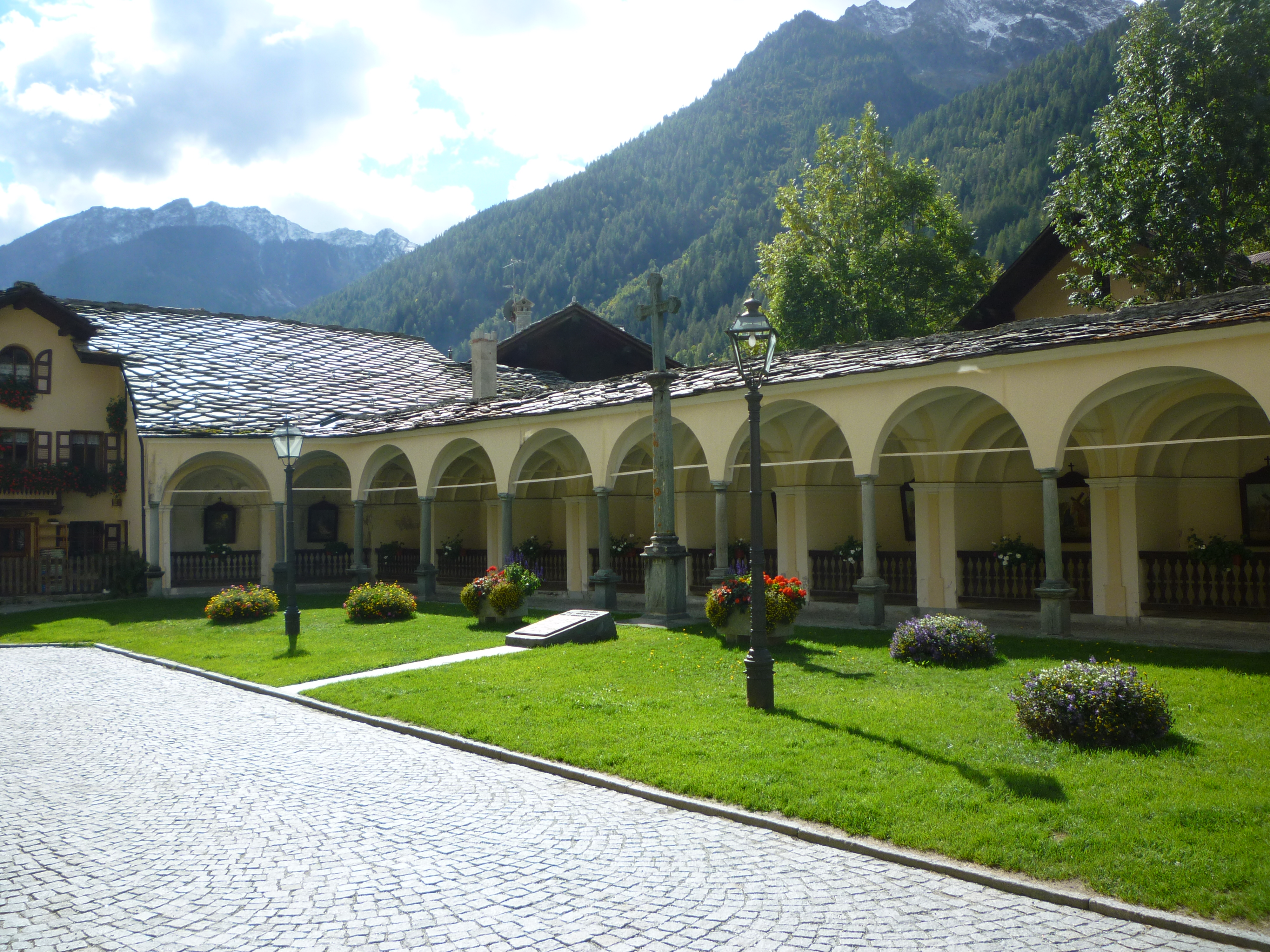 Parvis de Gressoney-Saint-Jean (Vallée d'Aoste - Italie)